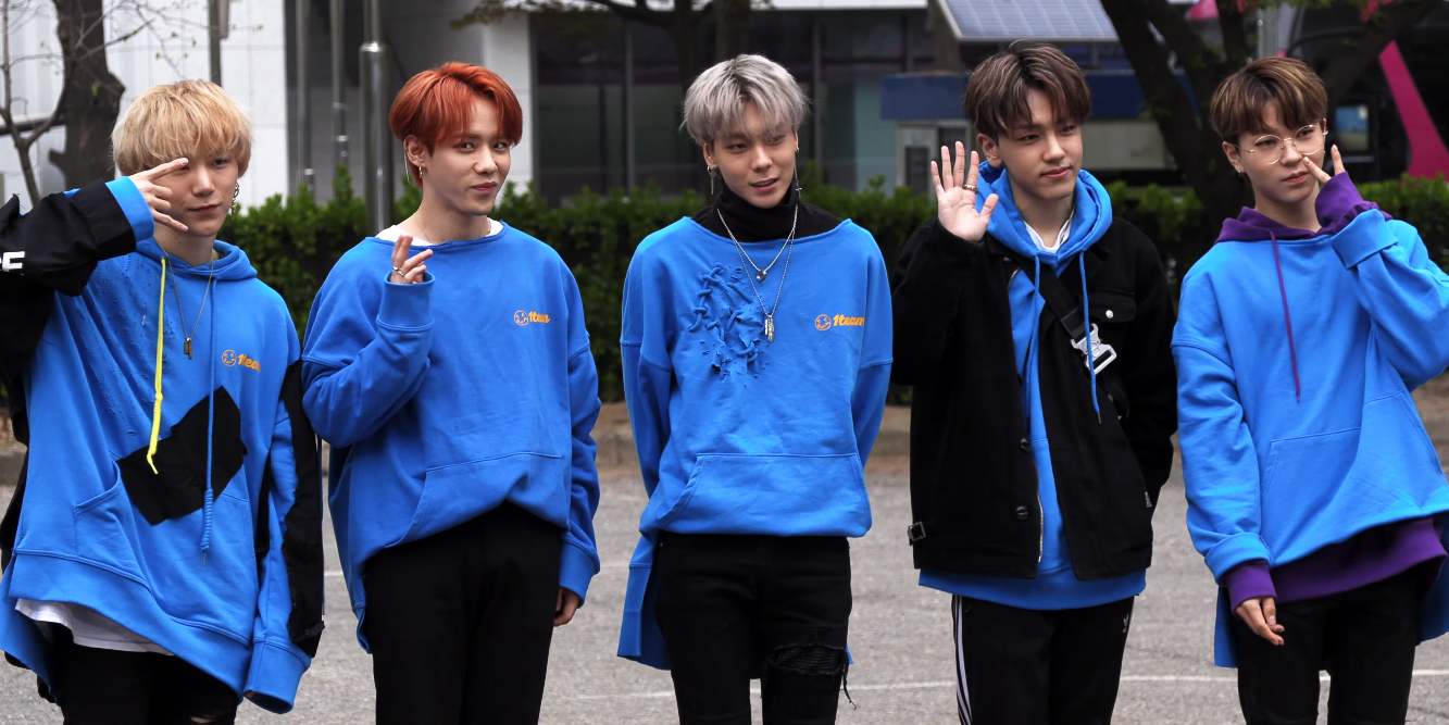 원팀 #1TEAM #성리 #김성리 #뮤직뱅크 #루빈 #BC #진우 #제현 #정훈 4월 19일 KBS 뮤직뱅크에 원팀, 김성리가 출근하고 있다.19일 뮤직뱅크에는 1TEAM, BVNDIT (밴디트), EVERGLOW, IZ*ONE (아이즈원), JBJ95, Stray Kids (스트레이 키즈), 강시원, 다이아, 드림노트 (DreamNote), 모모랜드, 방탄소년단, 성리, 슈퍼주니어-D&E, 스테파니, 원더나인, 최현상, 펜타곤, 핑크판타지SHY, 홀리데이가 출연한다. ©The JH Media